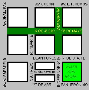 Esquema de las calles que fueron peatonalizadas en la ciudad de Córdoba en 1969/70.